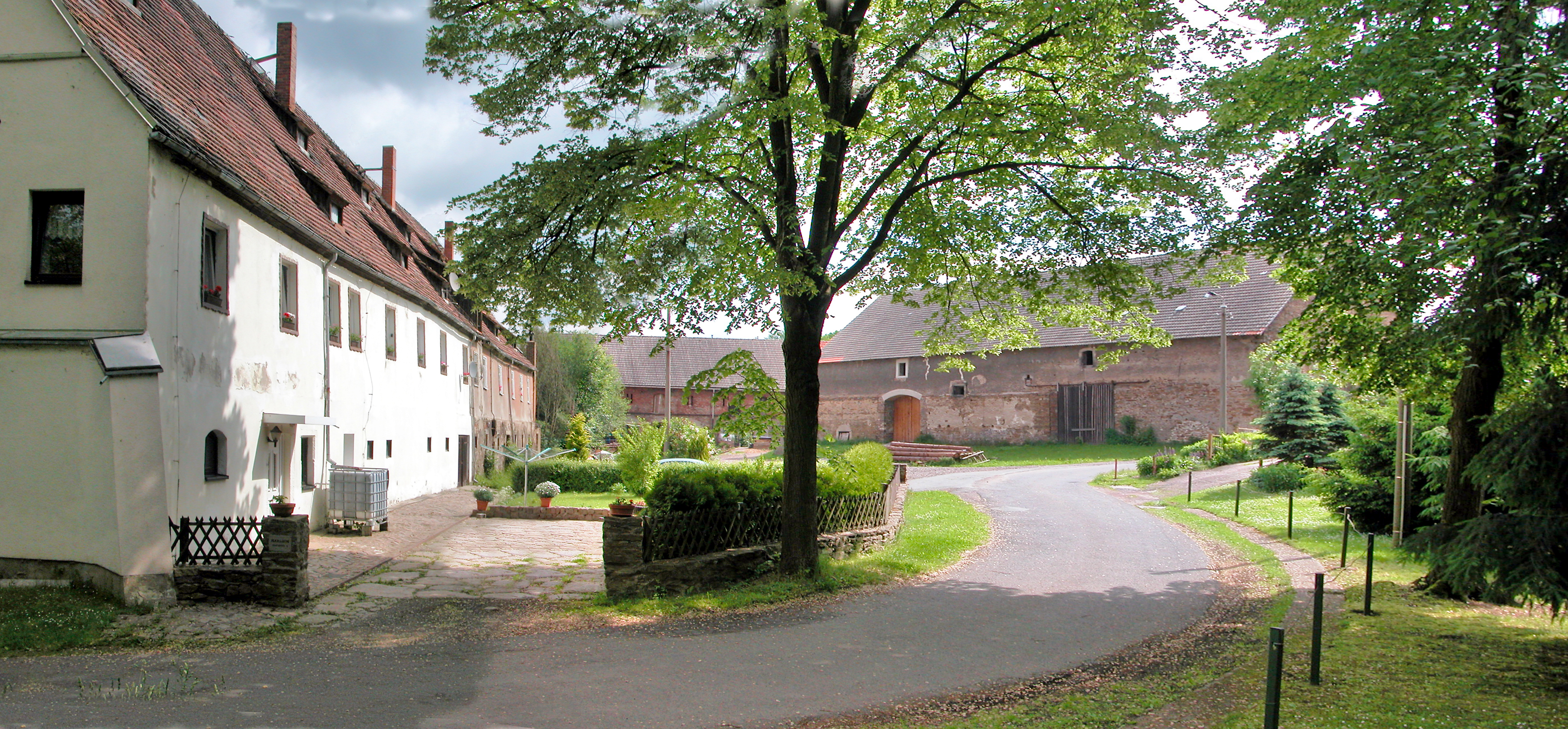 23.05.2009 09633 Krummenhennersdorf (Halsbrücke), Hofberg 1-5 (GMP: 50.982071,13.368777): Rittergut. Rechts der Schloßteich. Das Herrenhaus war nach dem Kriege mit Flüchtlingen belegt und ist abgebrannt. Davon ist nichts mehr vorhanden. [DSCN37597-37598.TIF]20090523105MDR.JPG(c)Blobelt